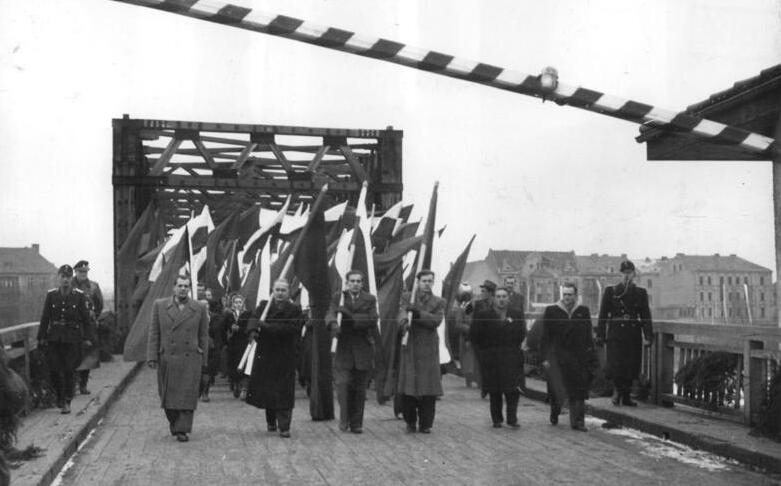 Zentralbild-Illus 12.2.1951 Abschlussprotokoll über Oder-Neiße-Grenze unterzeichnet. Am 27. Januar 1951 unterzeichneten der Leiter des polnischen Aussenministeriums Skrzeszweski in Frankfurt-Oder das Abschlußprotokoll der Grenzmarkierung der Oder-Neiße-Friedensgrenze. Damit ist die Friedensgrenze zwischen der Republik Polen und der DDR endgültig festgelegt. UBZ: Die polnische Delegation überschreitet die Grenzbrücke. Wenige Minuten später öffent sich der Schlagbaum.